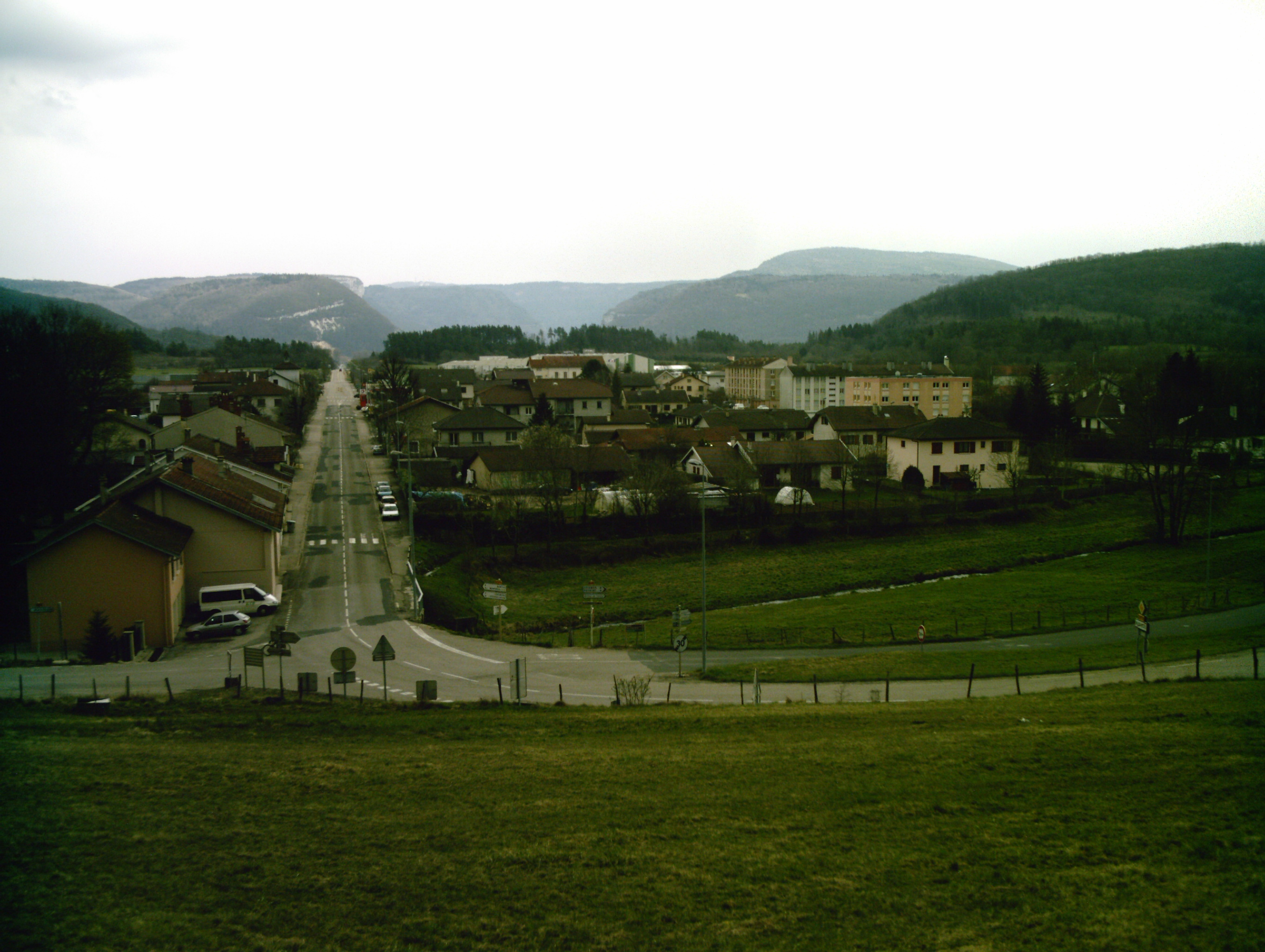 village de Nurieux-Volognat (pris depuis la montée du Berthiand)